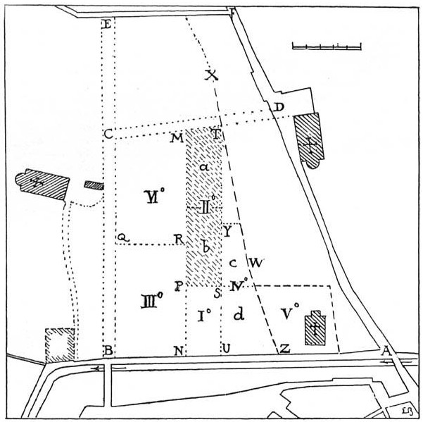 Vigna di Leonardo da Vinci nella ricostruzione di Luca Beltrami. XTWZ: linea del confine fra la Vigna di S. Vittore, e il borgo delle Grazie AD, prima del 1498. BCE-CD: nuove arterie decretate da Lodovico il Moro nel 1498. MN: prima linea di suddivisione della zona ex-vigna di S. Vittore. TU: seconda linea di suddivisione della zona ex-vigna di S. Vittore. Lotto I° (NPSU) assegnato alla ved. Crotta nel 1498 (pertiche 6 e 7) come permuta di altro terreno nella zona X. II° (MPST) assegnato a Leonardo (pertiche 16): a parte Salai; b parte Villani. III° (BNPRQ) assegnato alle Monache di S. Lazzaro (pertiche 25). IV° (UZWYS) assegnato al Monastero di S. Gerolamo. V° Terreno ceduto dal monastero di S. Vittore, anteriormente alla sistemazione di Lodovico il Moro, per erigere il monastero di S. Gerolamo. VI° Terreno di proprietà ducale, di cui non si conoscono le assegnazioni.